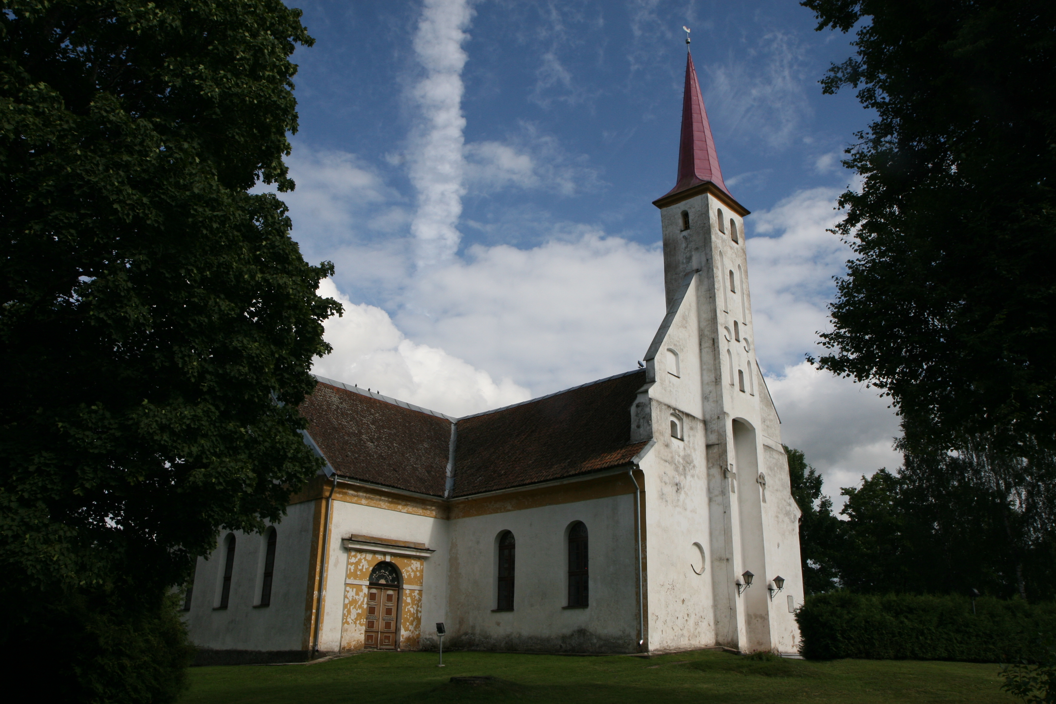 Põlva Maarja kirik